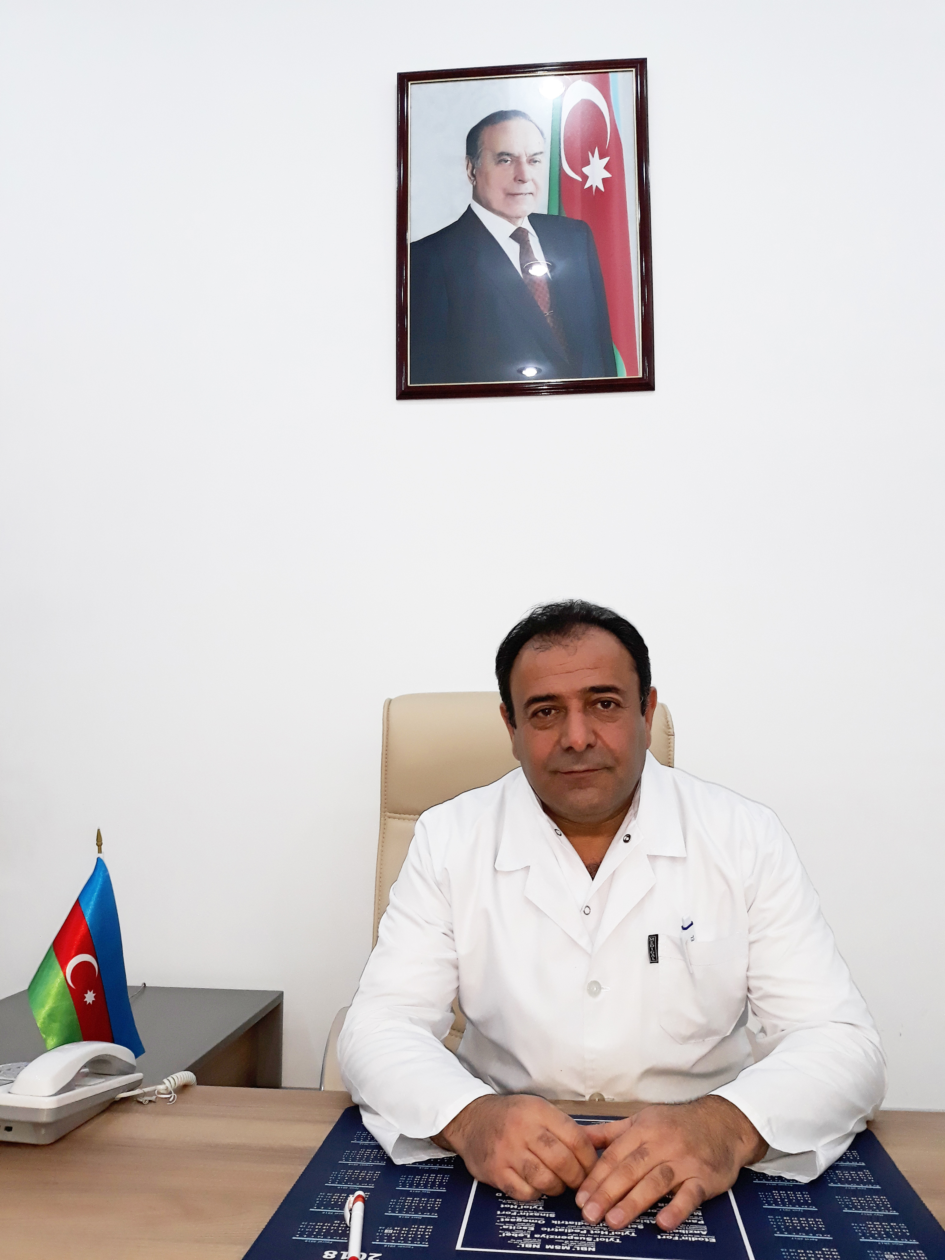 İmran Qurbanov (azərb. Qurbanov İmran Hümbət oğlu; d. 17 aprel, 1964. Nərimanlı, Basarkeçər rayonu, Ermənistan SSR, SSRİ) – Azərbaycan həkimi, tibb xidməti kapitanı (1994), 701 saylı hərbi hissənin tibb bölüyünün komandiri (1992), Baş Qərargah polikilinkasının cərahiyyə şöbəsinin rəisi (1994-1997), Qarabağ müharibəsi iştirakçısı, Respublika Kliniki Xəstəxanasında qəbul şöbəsinin müdiri (1998-indi) və baş həkimin cərrahi işlər üzrə müavini (2013-indi), "Azərbaycan Respublikası Silahlı Qüvvələrinin 90 illiyi (1918-2008)" yubiley medalı (2013) laureatı, Prezident təqaütçüsü.